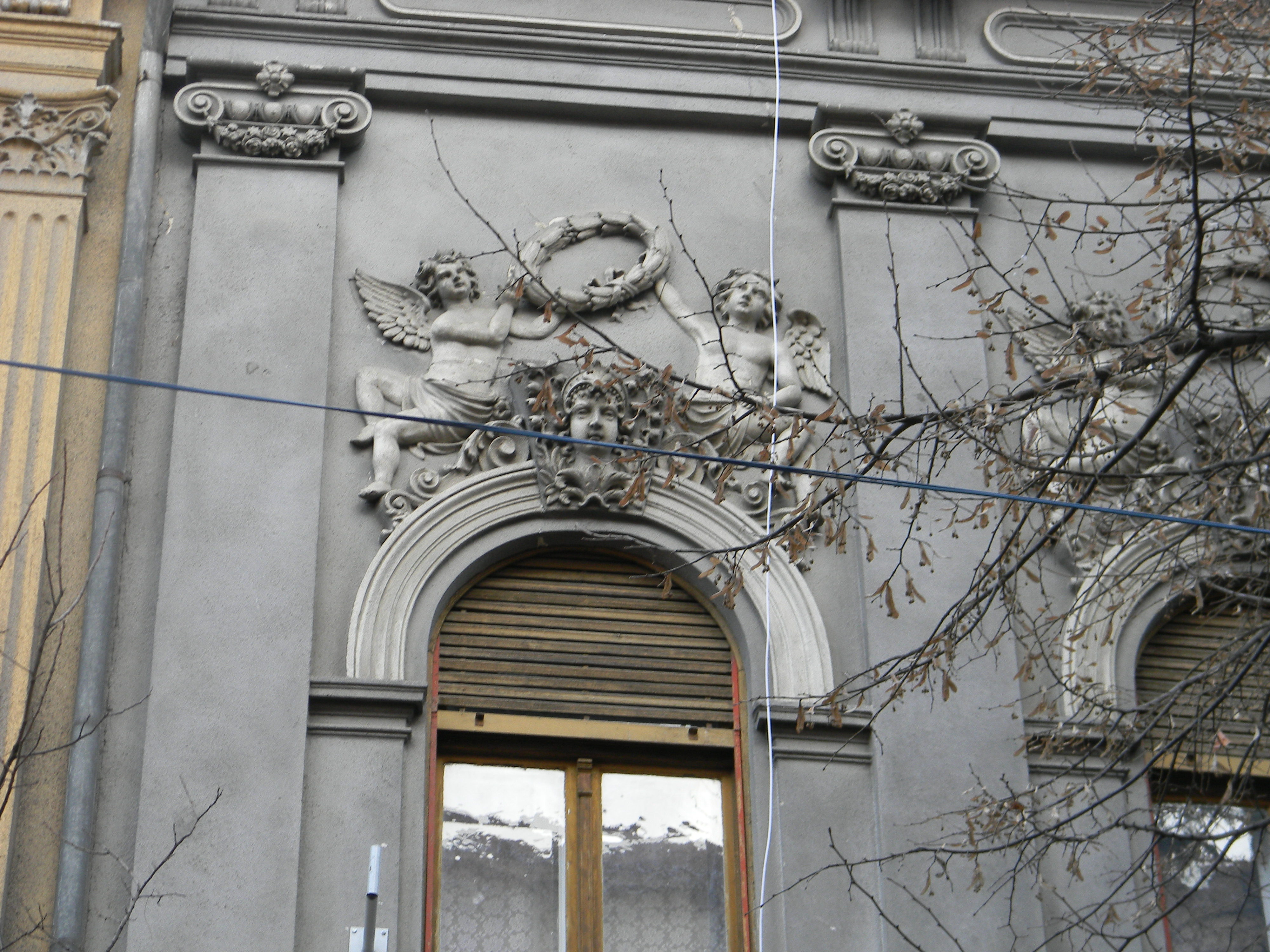 Casă - Aviator Georgescu Nr 11 Arad Detaliu